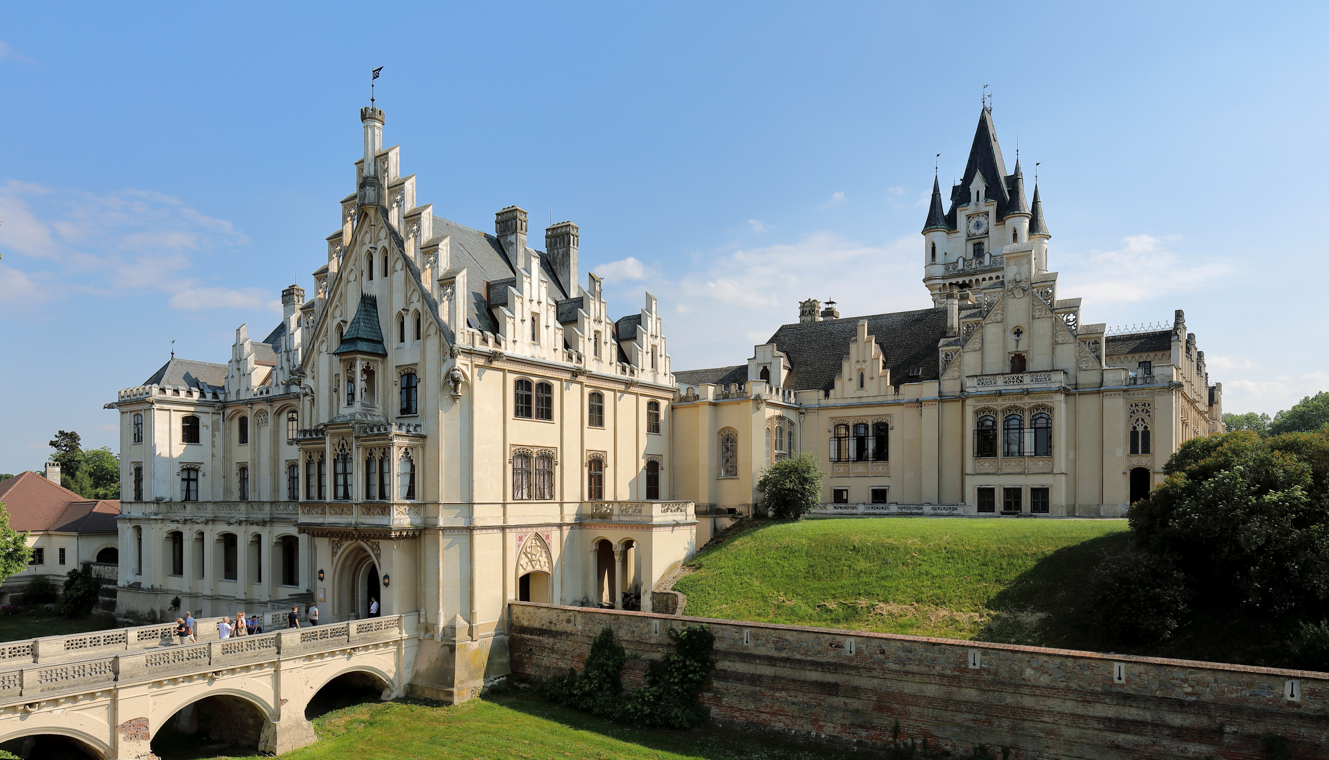 Nordansicht des Nordwestbereiches des Schlosses Grafenegg in der niederösterreichischen Marktgemeinde Grafenegg. Urkundlich 1294 als Festes Haus mit Mauer und Graben aufscheinend, wurde die Anlage 1645 im Zuge des Dreißigjährigen Krieges durch die Schweden gestürmt. Anschließend erfolgte die Wiederinstandsetzung und der Ausbau zu einer Vierflügelanlage. Von 1845 bis 1872 fand ein weiterer Aus- und Umbau zu einer romantisch-historistischen Schlossanlage statt und das Schloss erhielt dabei im Wesentlichen sein heutiges Erscheinungsbild. Die schweren Schäden infolge von Kriegs- und Nachkriegsereignissen wurden durch eine Restauration und Wiederinstandsetzung ab 1967 behoben.